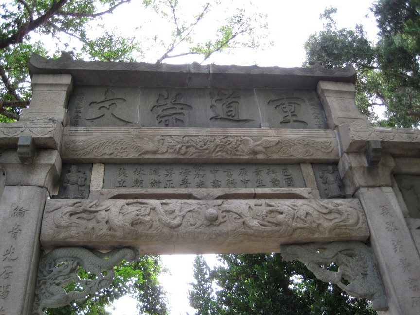 重道崇文坊上頭的石碑